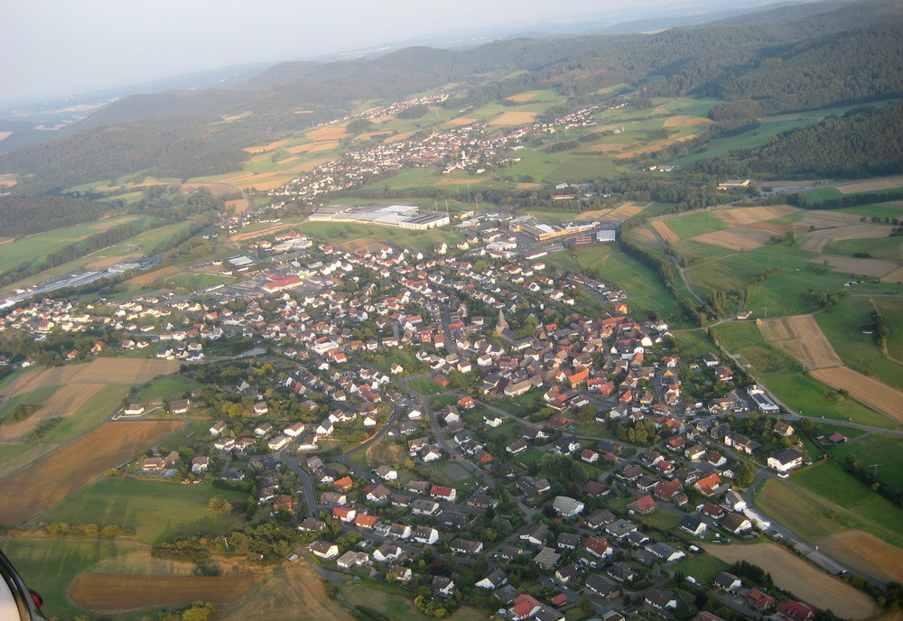 Luftaufnahme Kerngemeinde Dautphe